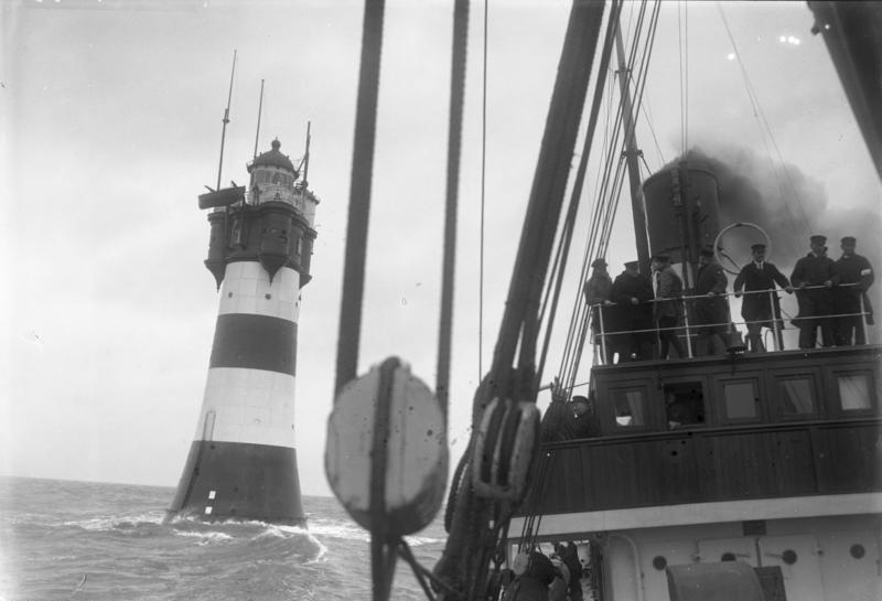 Gefahrvolle Ablösung und Verproviantierung der Leuchtturmwächter am "Roter-Sand" in der Nordsee an der Wesermündung bei Bremerhaven! Das Schiff mit der Ablösungsmannschaft nähert sich dem mitten im Meere stehenden "Roter-Sand"-Leuchtturm.